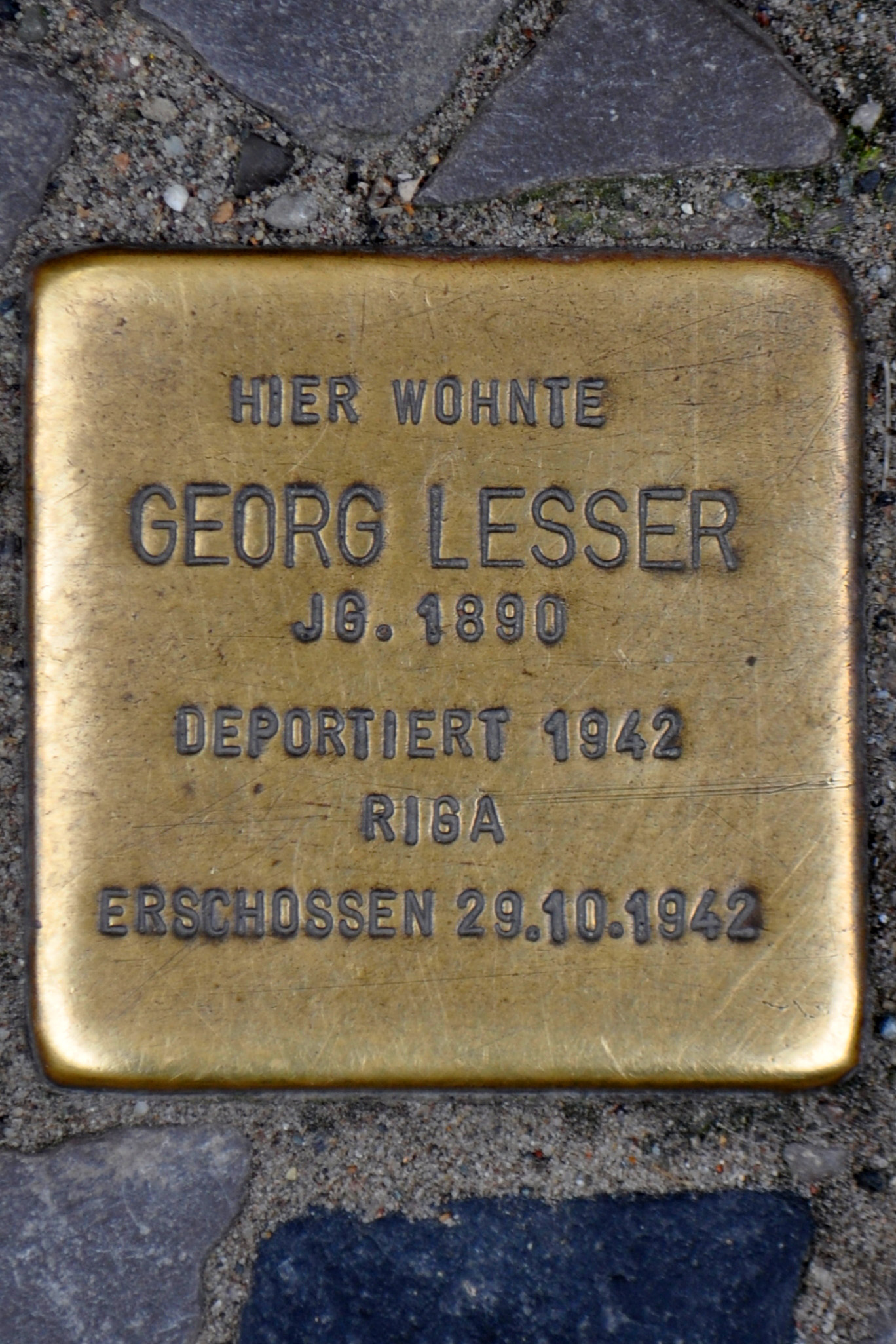 Stolperstein in Stralsund, Ossenreyerstraße 21/22. Der Stolperstein ist einer von fünf Stolpersteinen an dieser Adresse. Text: Hier wohnte Georg Lesser Jg. 1890 deportiert 1942 Riga erschossen 29.10.1942